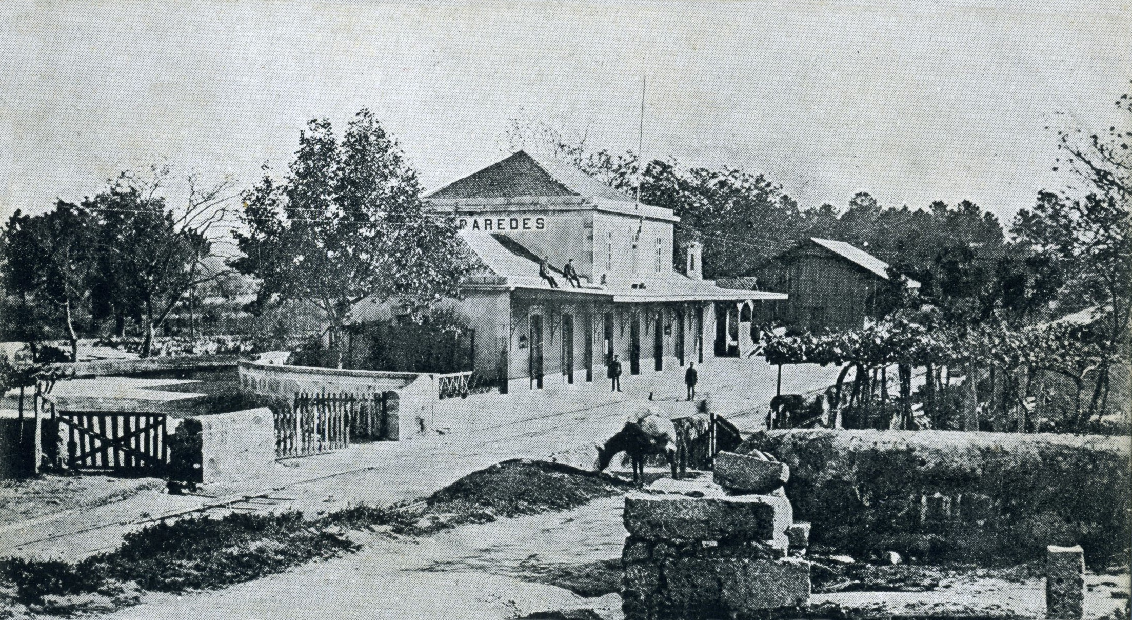 Gare de paredes, Portugal, peu de temps après sa construction.